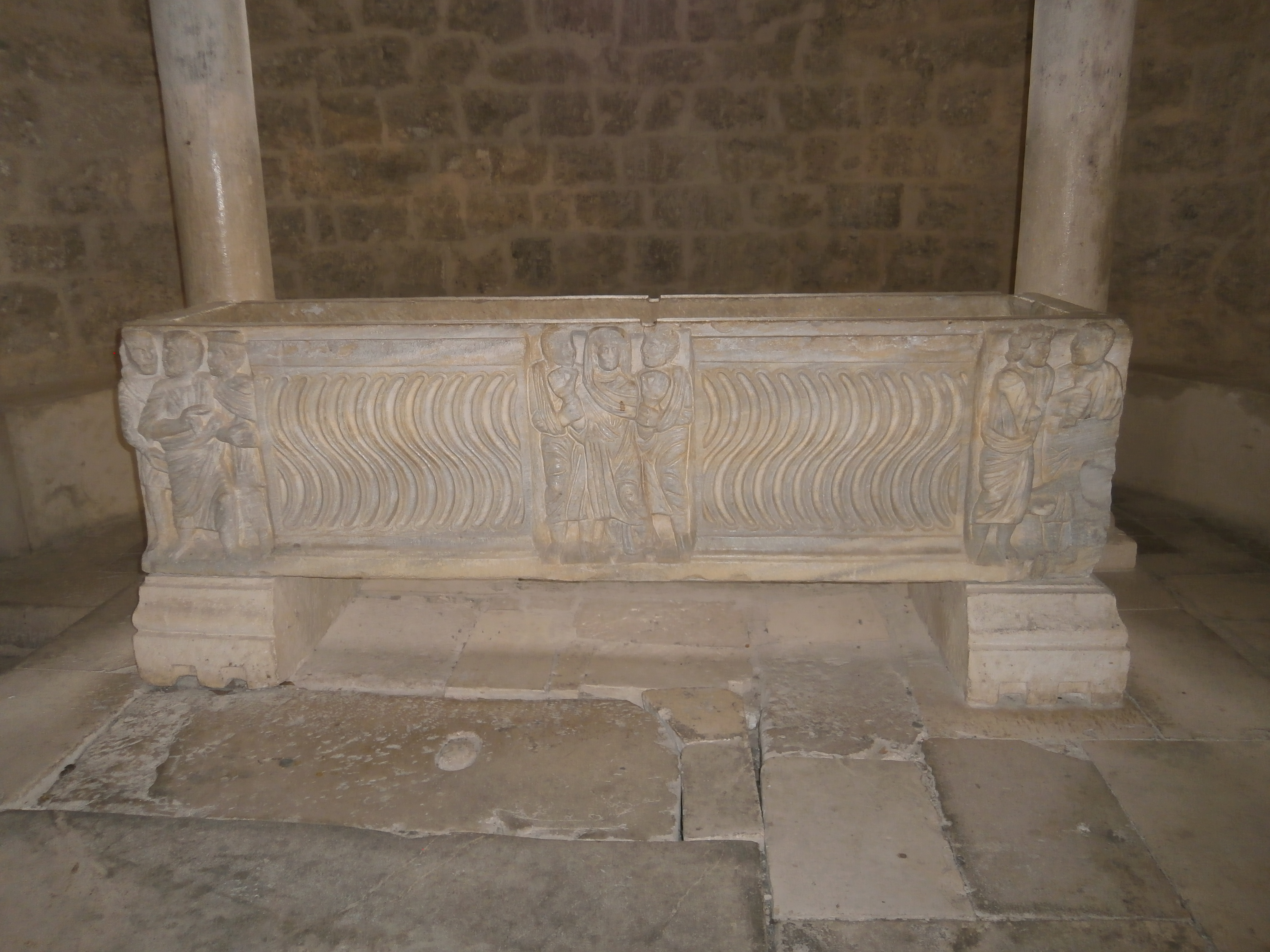 Abbazia di San Clemente a Casauria - altare nel ciborio